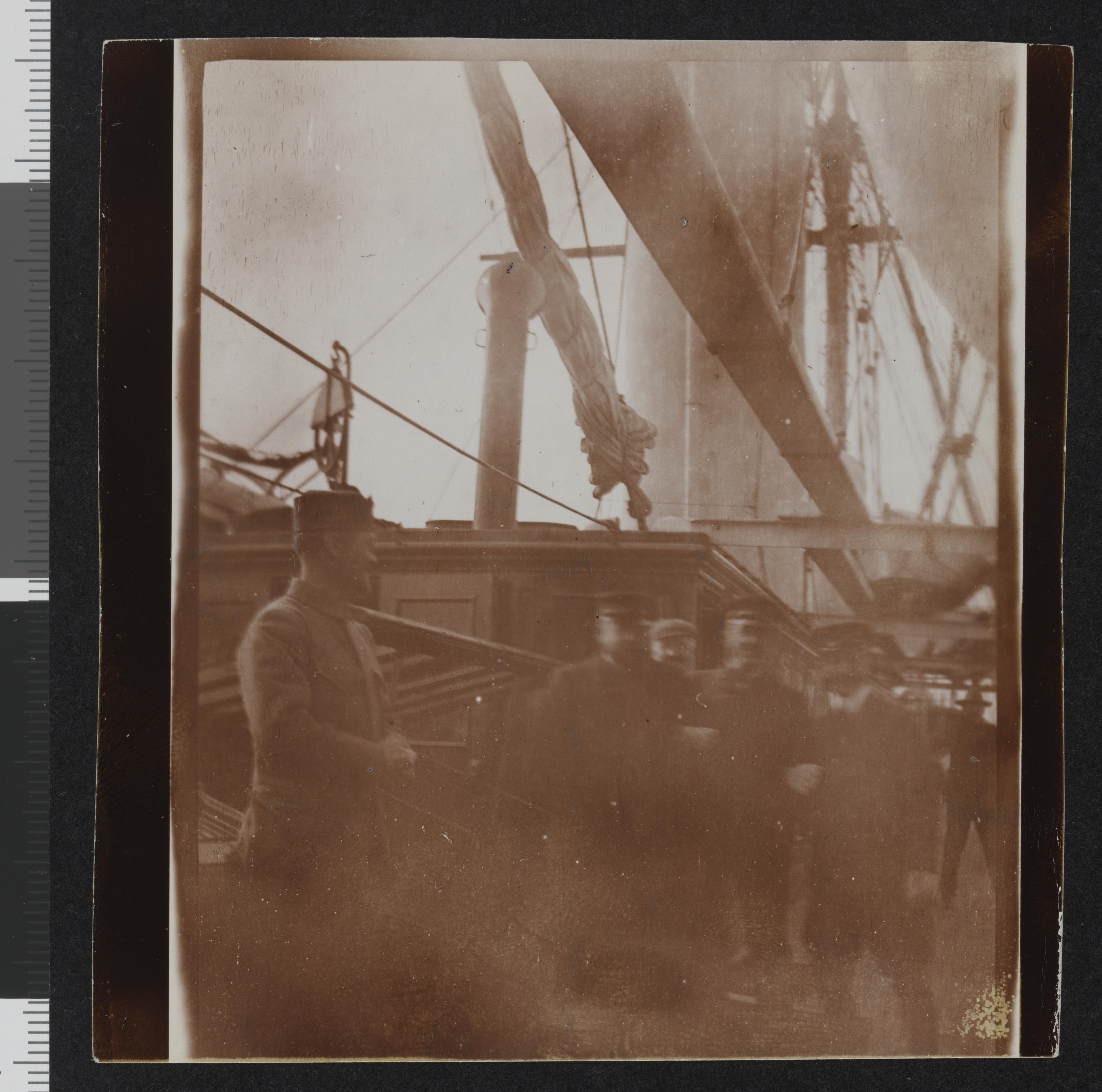 Bildet er hentet fra Nasjonalbibliotekets bildesamling. Anmerkninger til bildet var: Tittel tatt fra baksiden av fotografiet. Noe svak kopi Depicted person: Hoel, Adolf